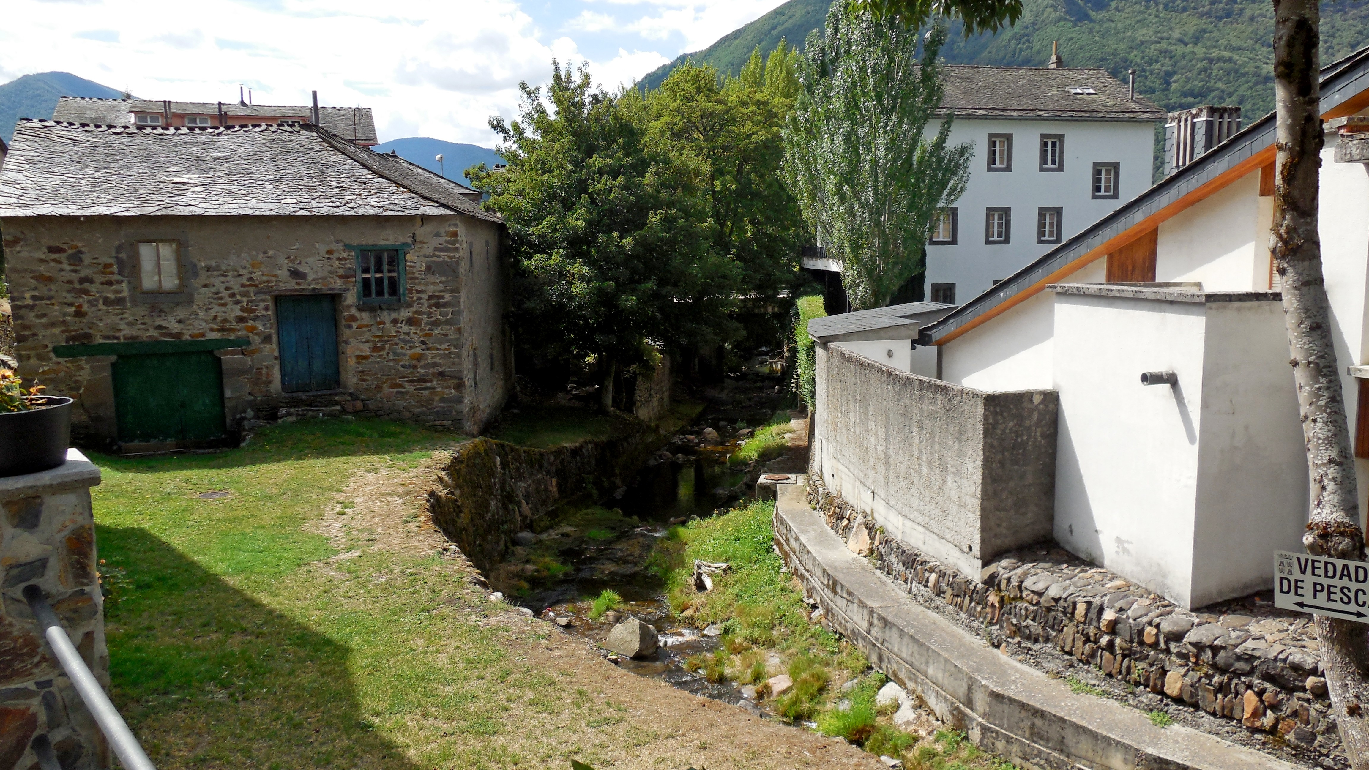 San Miguel de Laciana, Villablino (León, España).